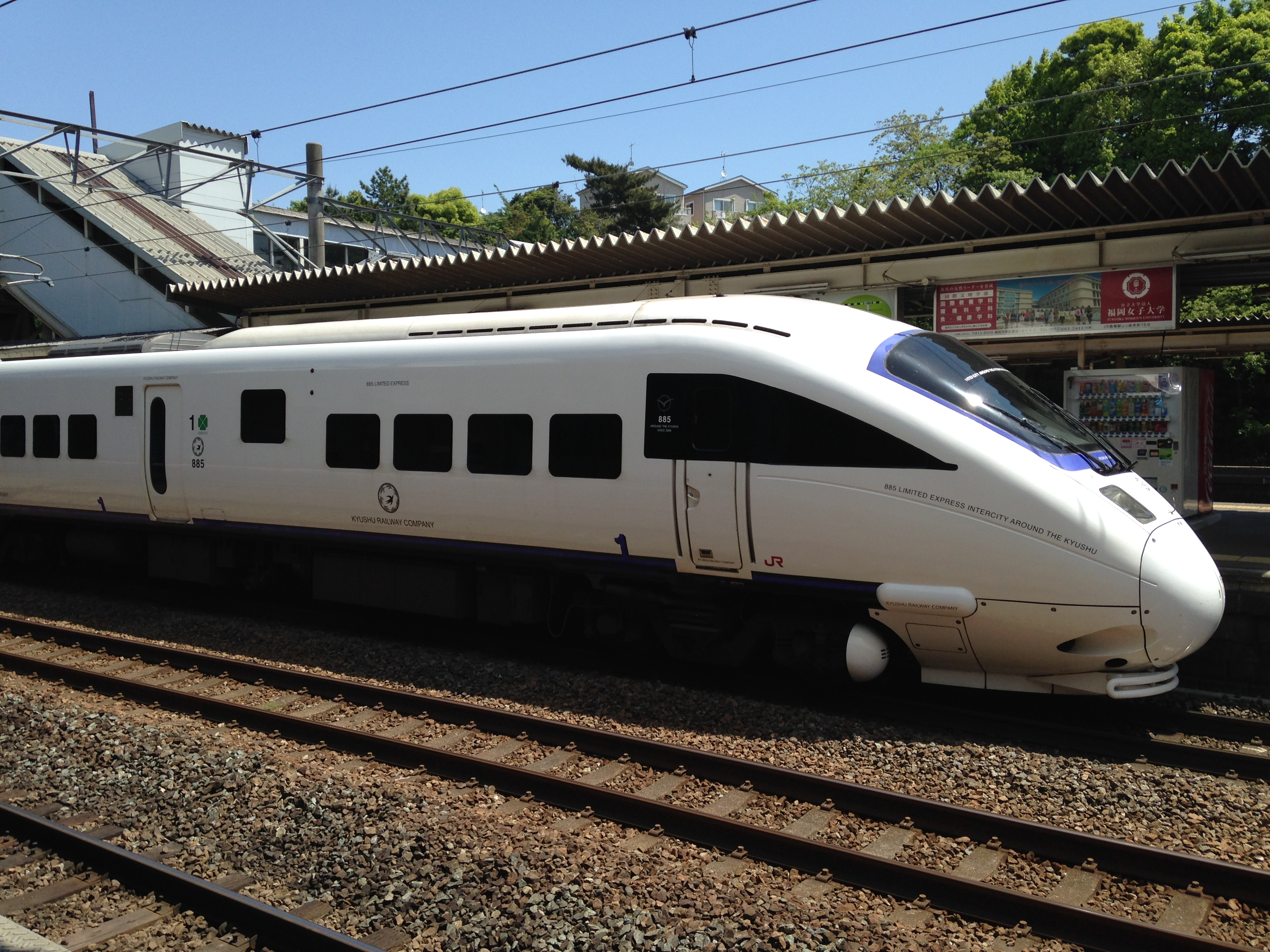 香椎駅にて停車中の博多行き特急「ソニック」